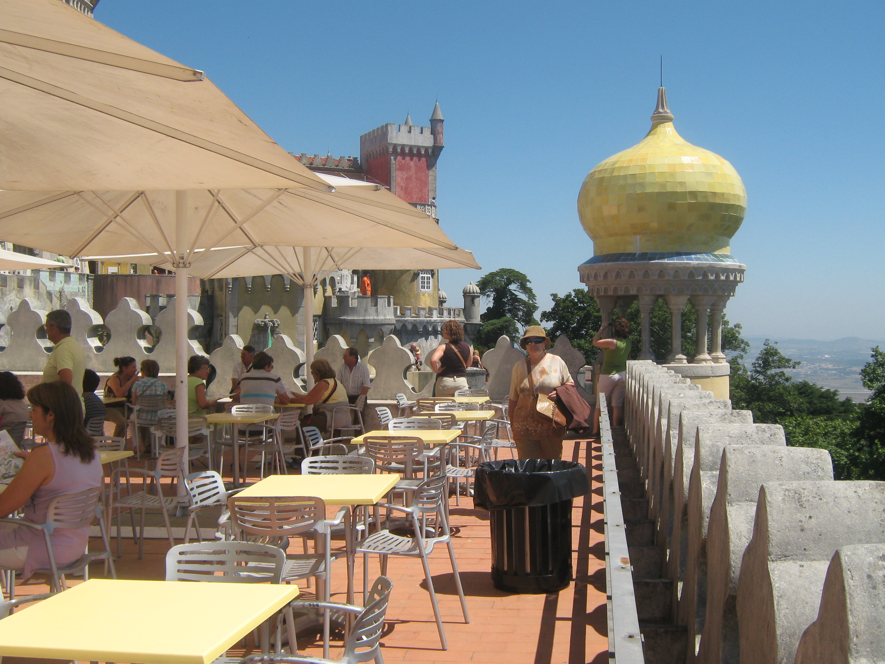 Palácio da Pena, Sintra